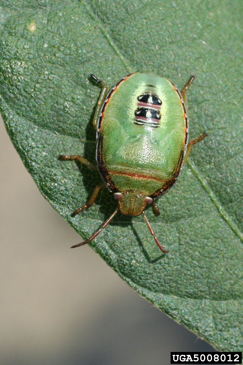 Piezodorus guildinii; family Pentatomidae